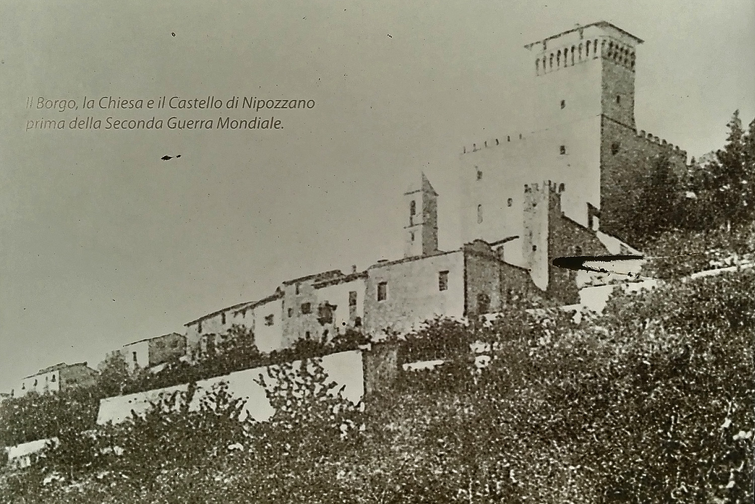 Il Borgo, la Chiesa e il Castello di Nipozzano prima della Seconda Guerra Mondiale